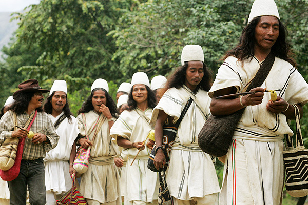 Tribu indígena colombiana, que sobrevivió a la colonización